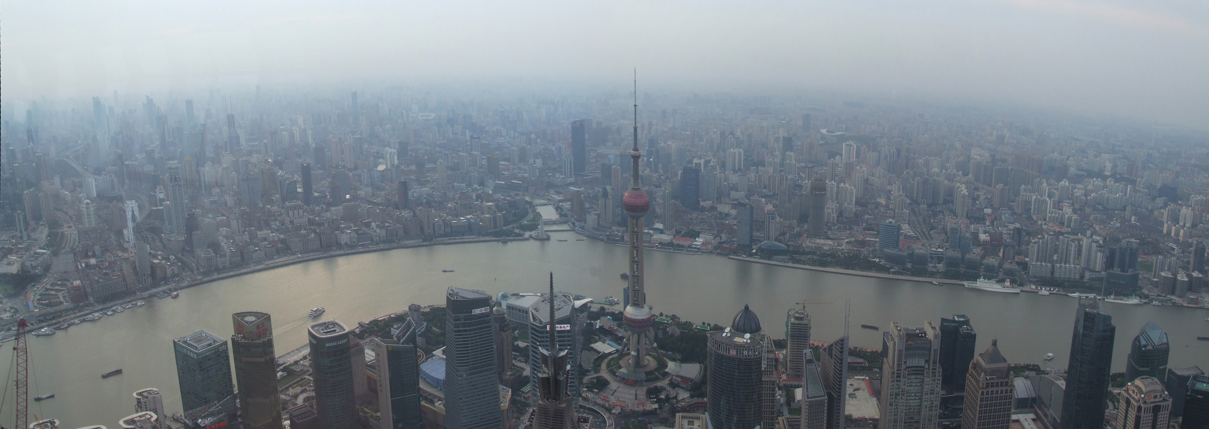 Panorama-Blick vom World Financial Center, Shanghai